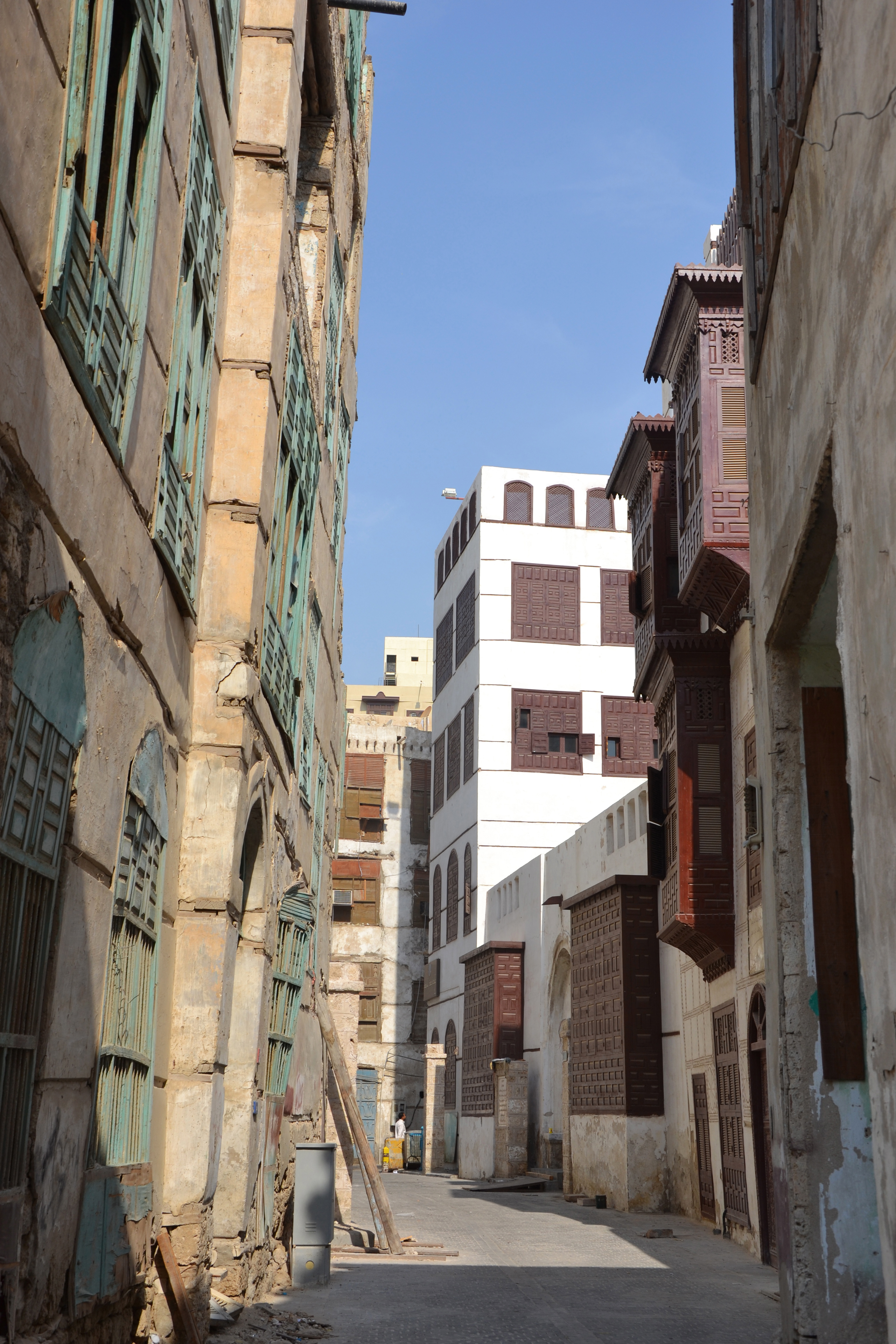 Jeddah